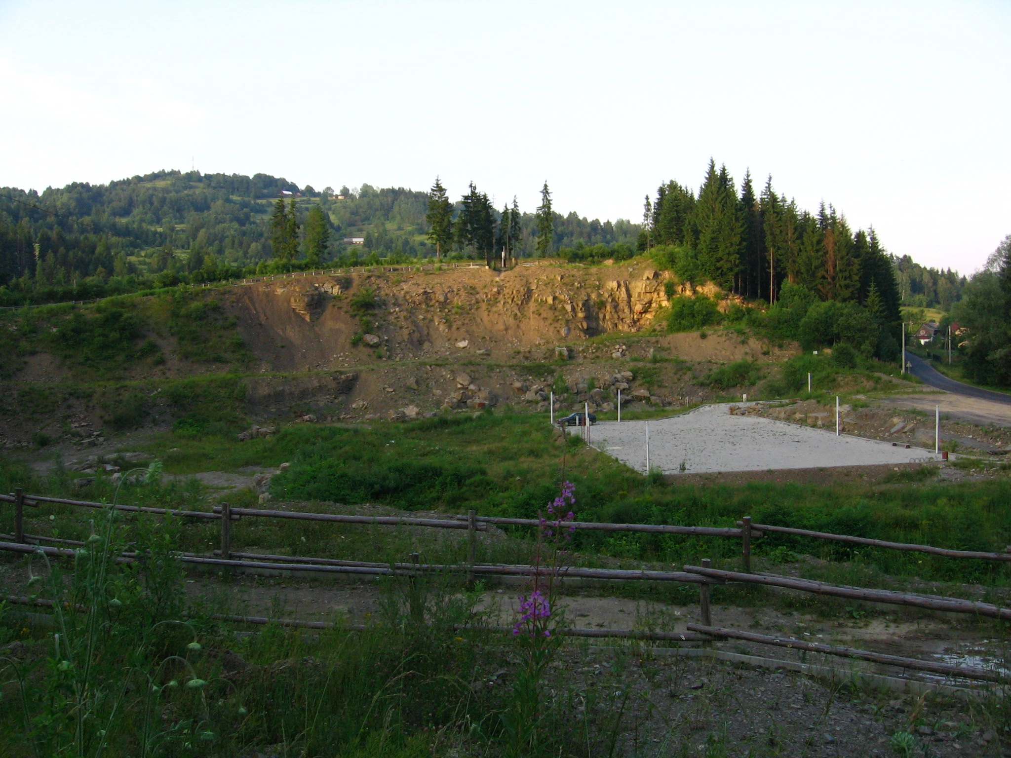 Wyrobisko dawnego kamieniołomu piaskowca w Glince, z lewej Kubiesówka (Kubieszówka).